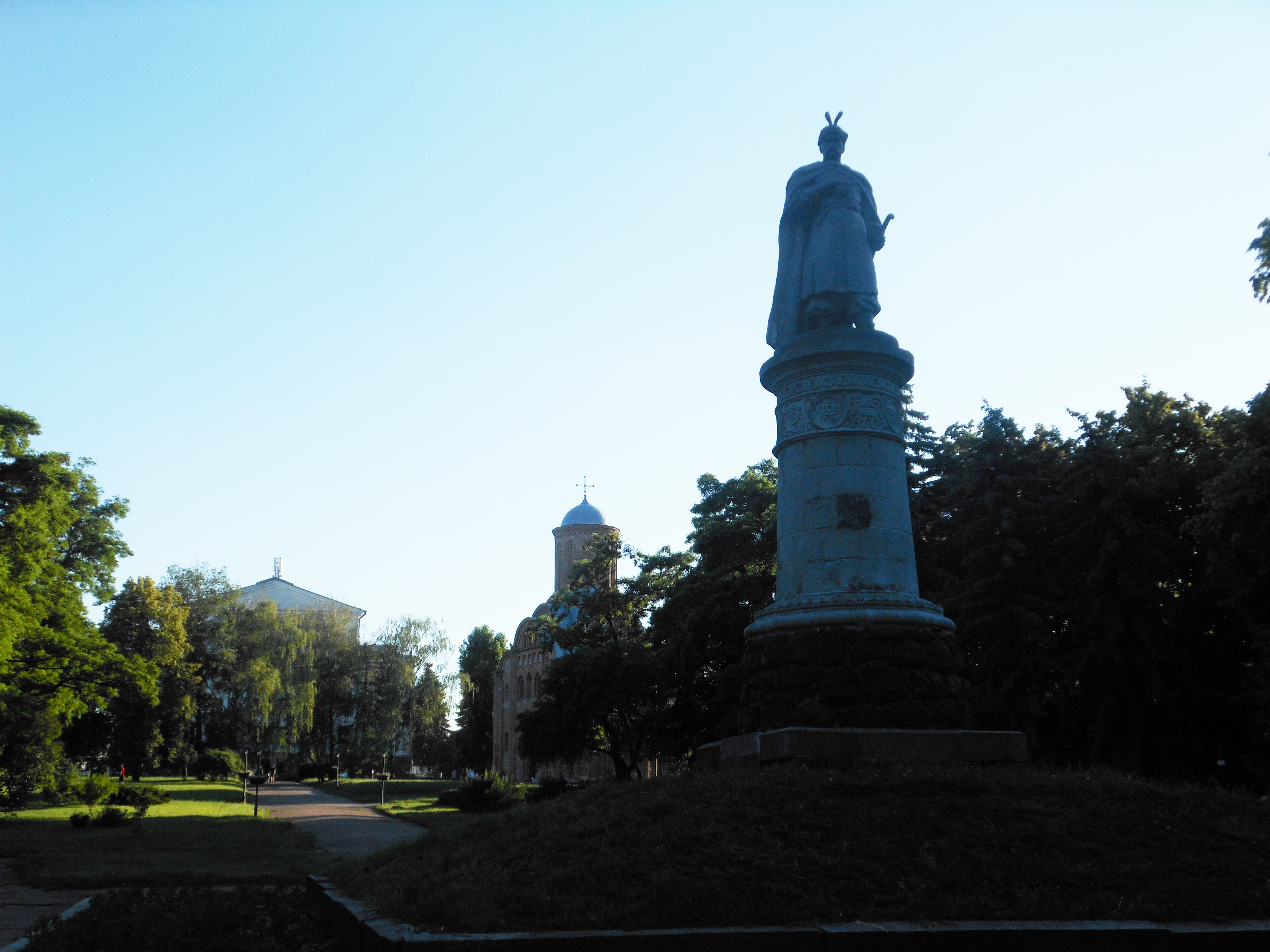 Пам’ятник Б. Хмельницькому – гетьману України, видатному державному діячу, полководцю, Чернігів, вул. Гетьмана Полуботка, сквер ім. Б.Хмельницького